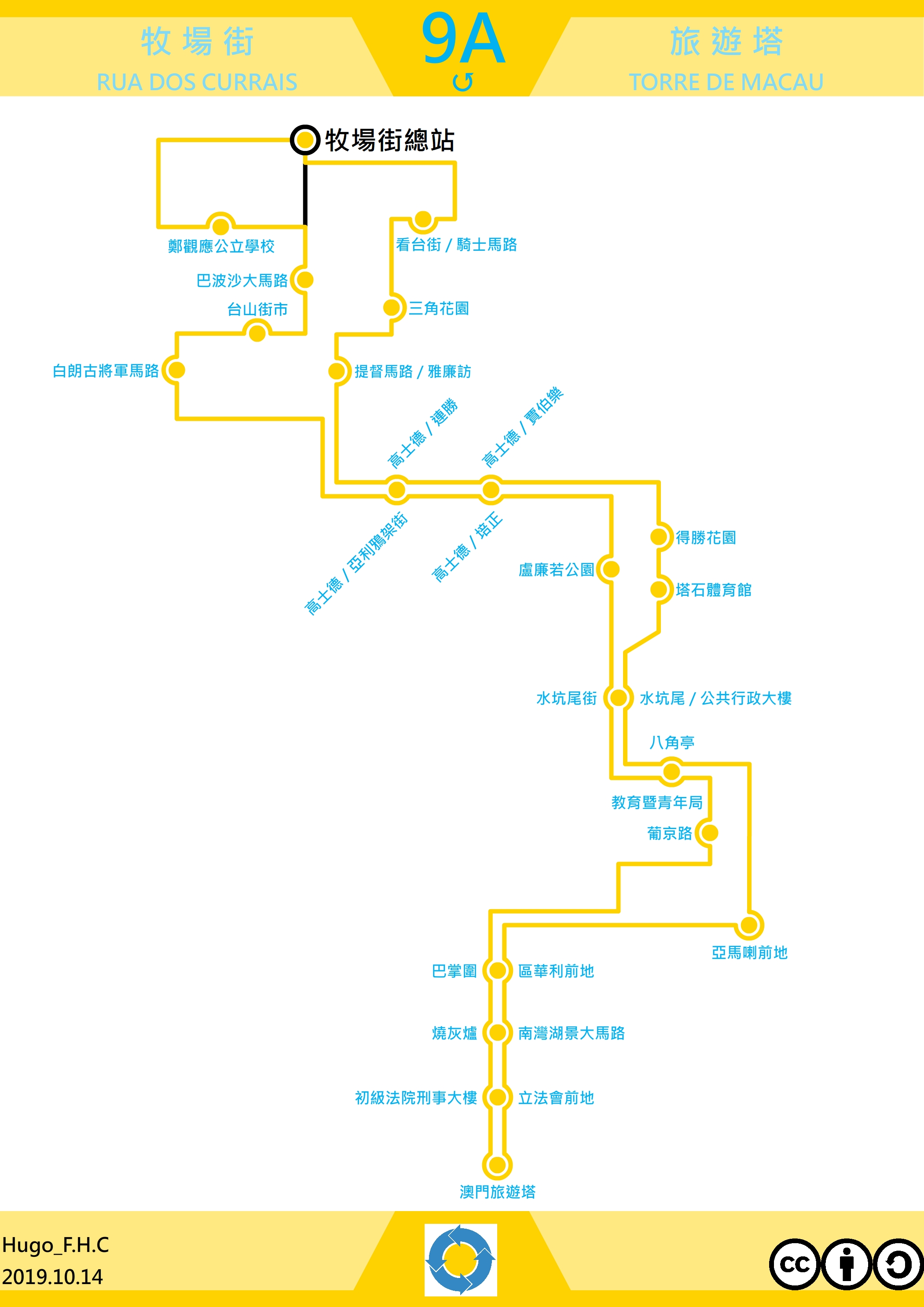 澳門巴士9A走線圖